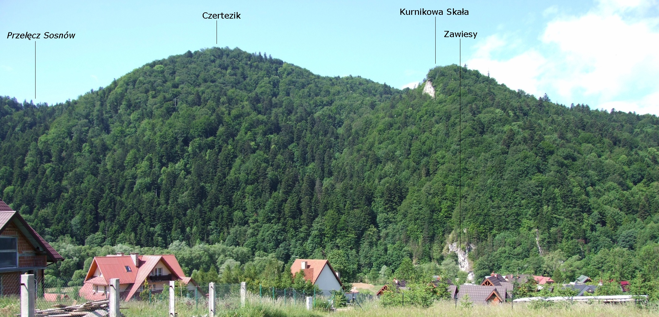 Widok na Pieninki od północnej strony